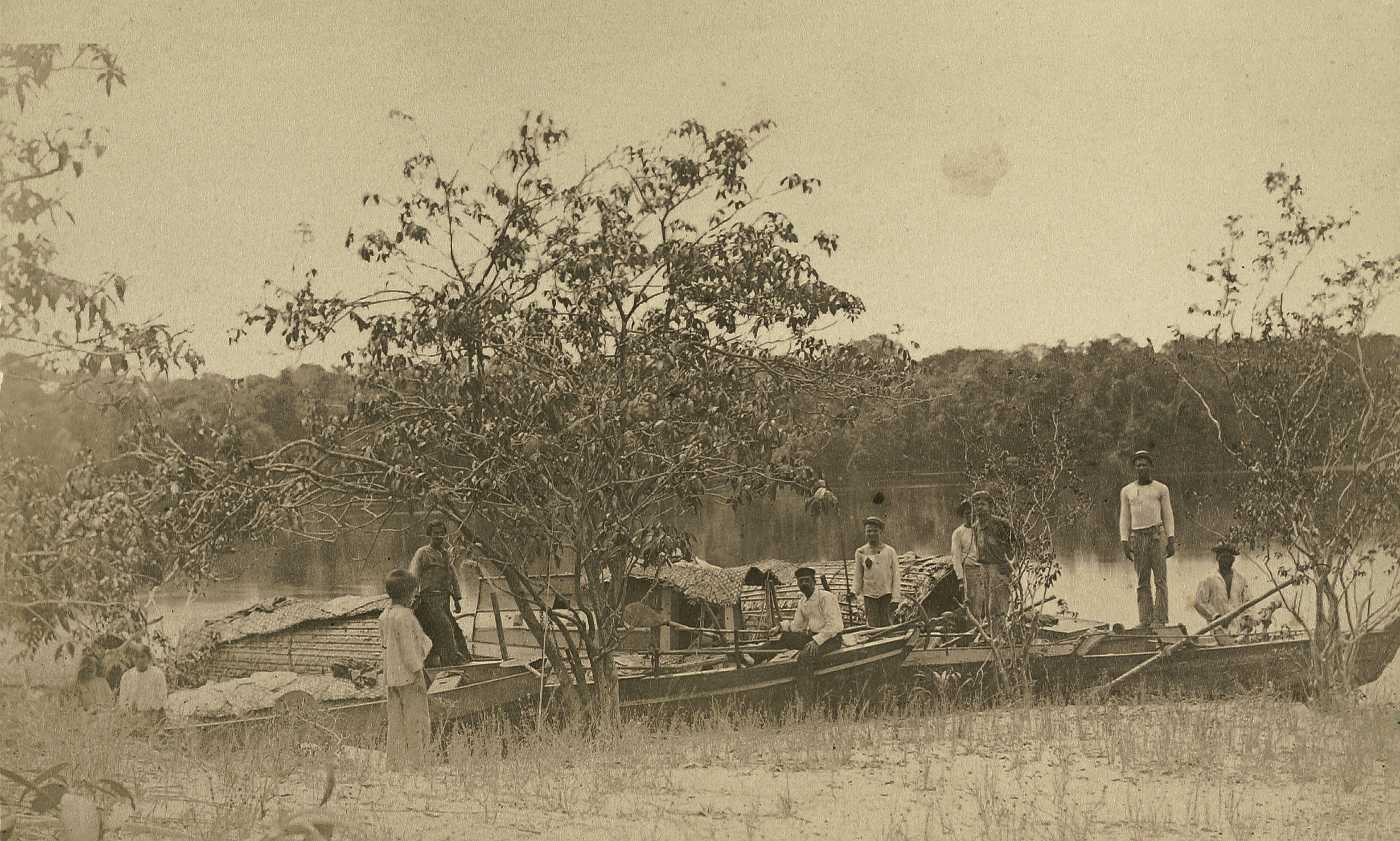 Caboclos na beira do rio Jauaperi.